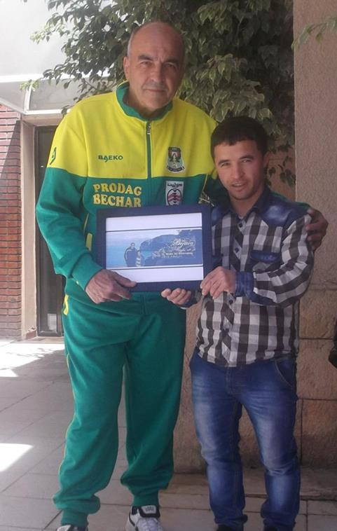 moi est le coche Alain Michel